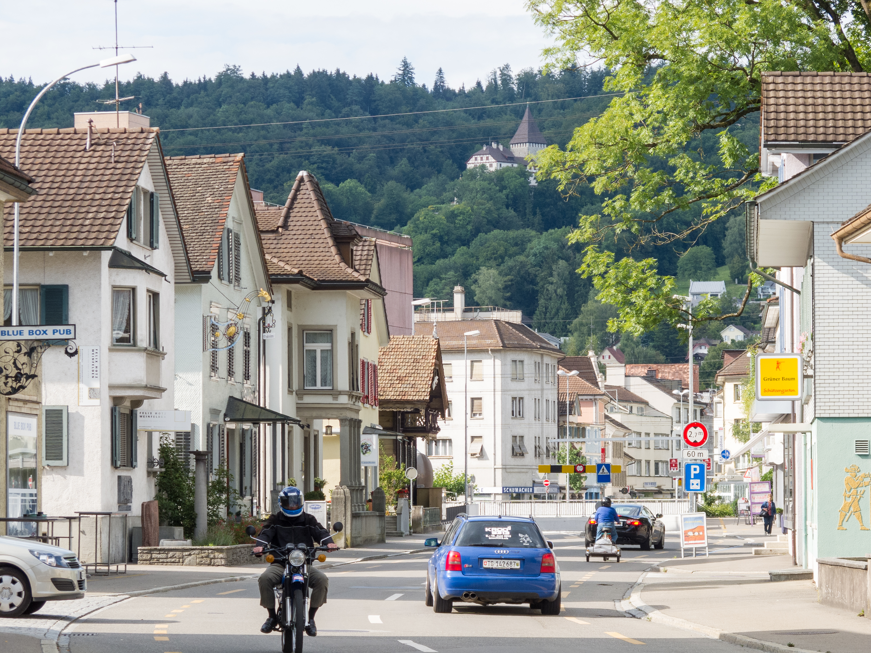 Wilerstrasse in Weinfelden (2011)